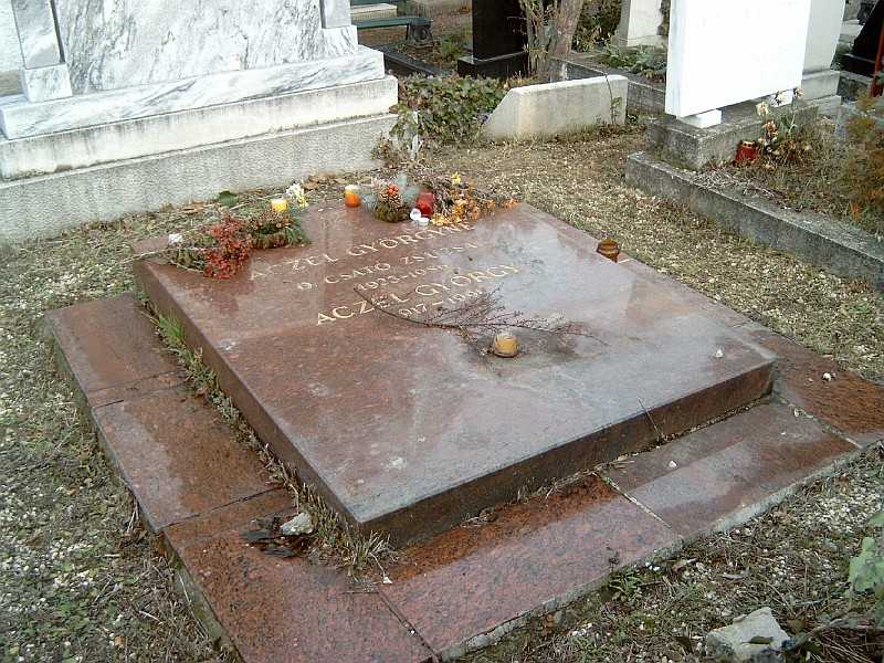 Aczél György (1917-1991) művelődéspolitikus, MSzMP vezetőségi tag, KB és PB tag, művelődési miniszterhelyettes, Országos Közművelődési Tanács elnöke, országgyűlési képviselő sírja Budapesten. Farkasréti temető: 48/3-2-6/7